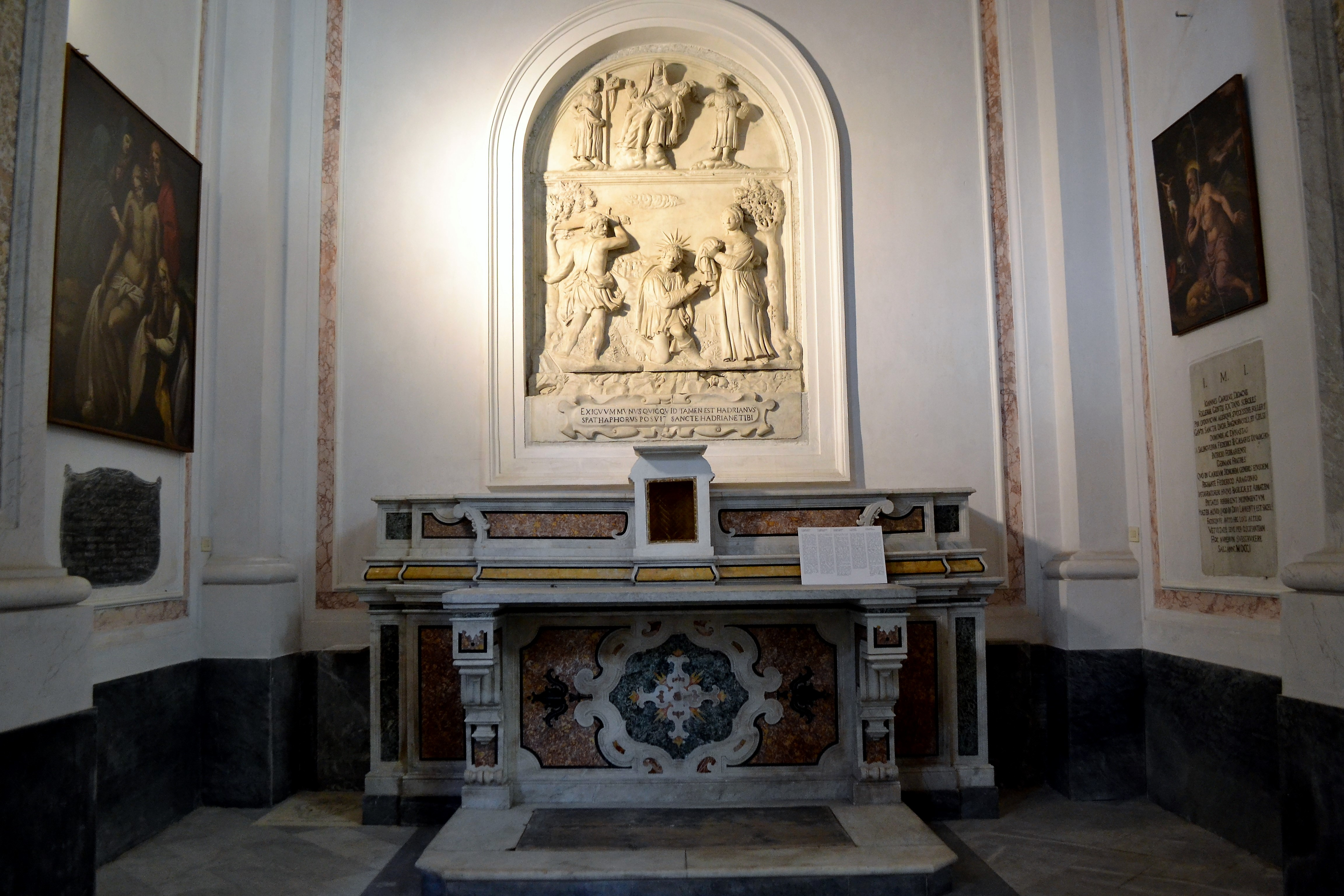 Cappella di Sant'Adriano . Chiesa di San Giovanni Maggiore di Napoli